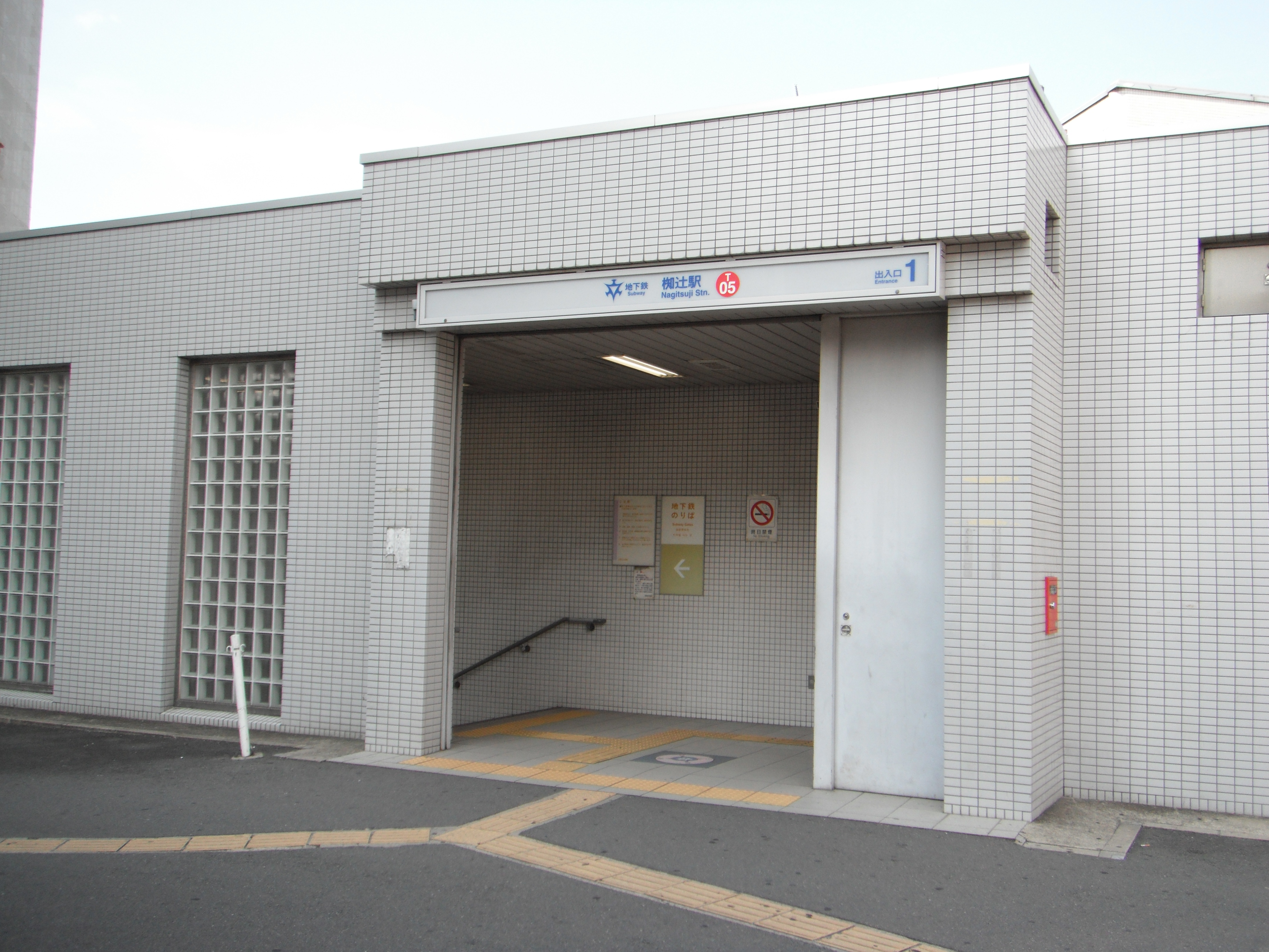 京都市営地下鉄東西線 椥辻駅 1番出入口（京都市山科区）